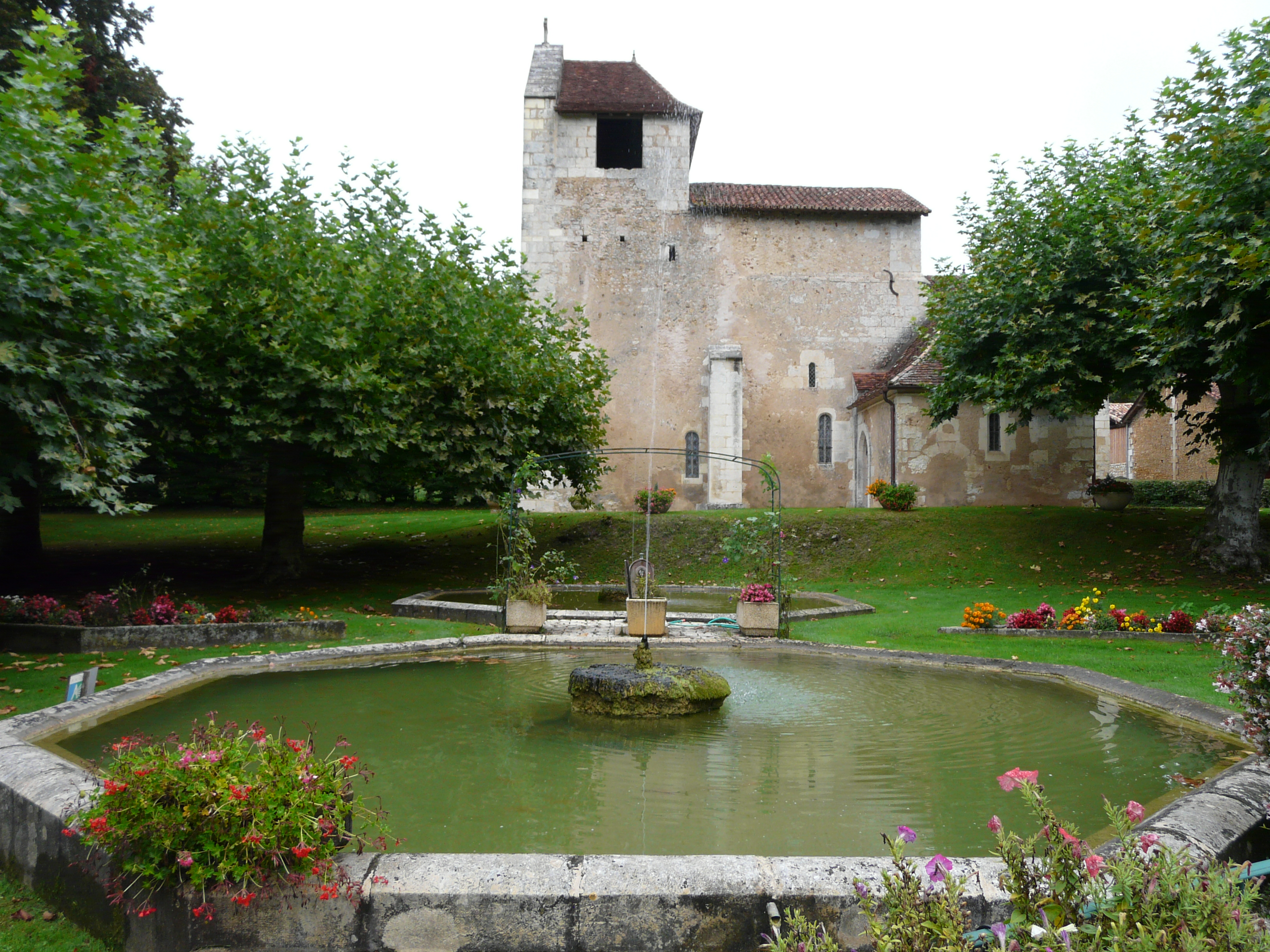 Parc et fontaines devant l'église de Saint-Hilaire-d'Estissac, Dordogne, France.